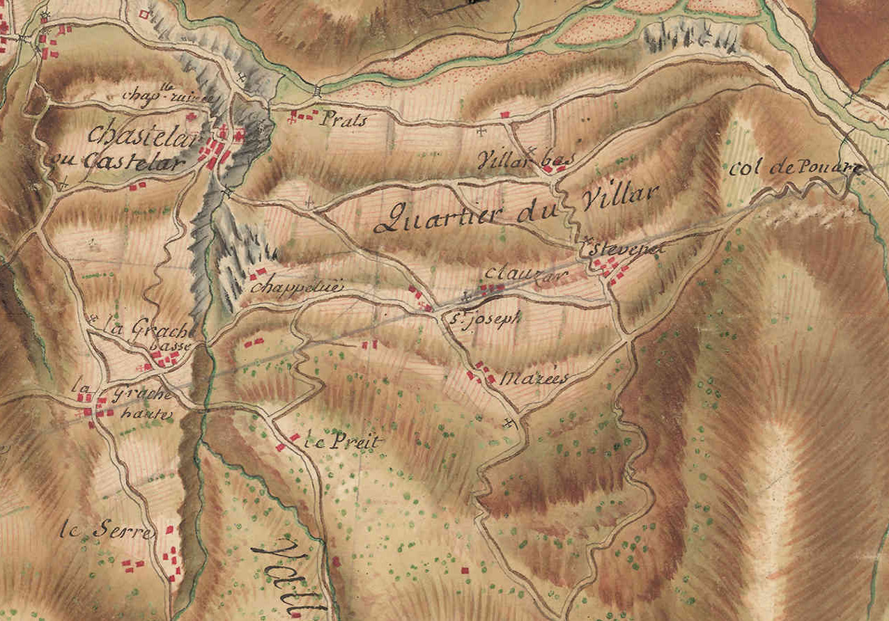 carte de Bourcet numérisé Paris, Nicolas-Alexandre et Olivier-Joseph, Extrait réduc JPG 30% Antoine-H